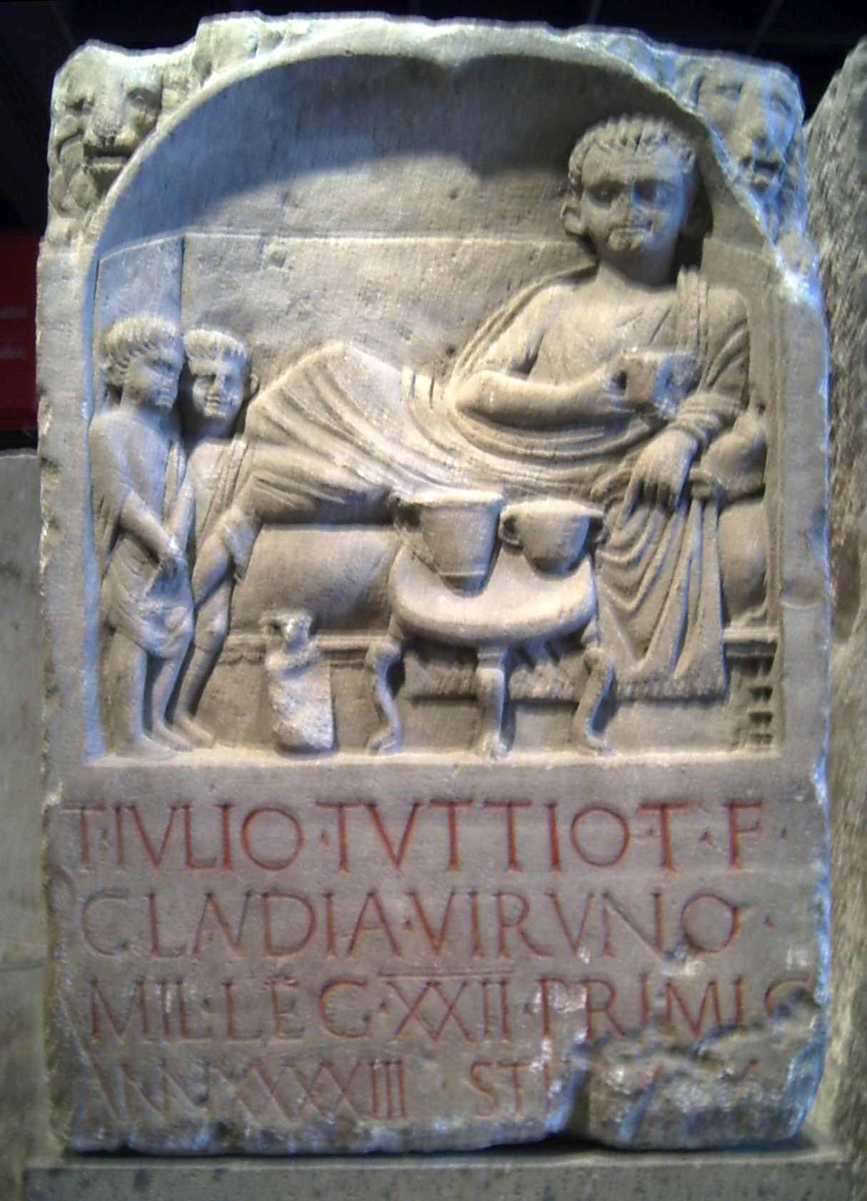 CIL XIII 8289. For other images, see gallery Römisch-Germanisches Museum.